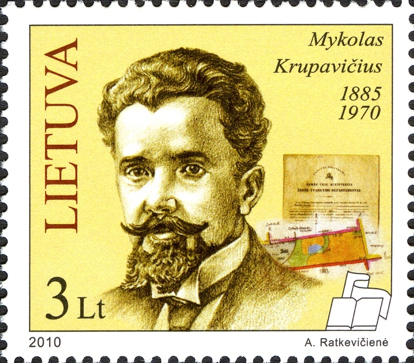 Famous People - Ecclesiastic, Politician, minister for Agriculture Mykolas Krupavicius